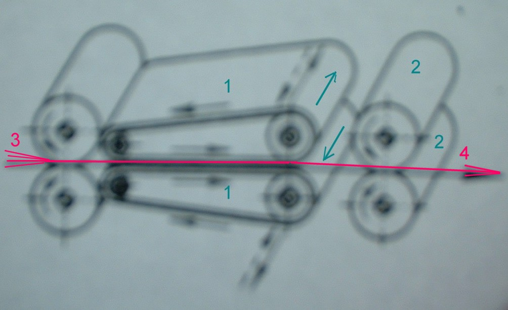 Schema: Nitschelwerk